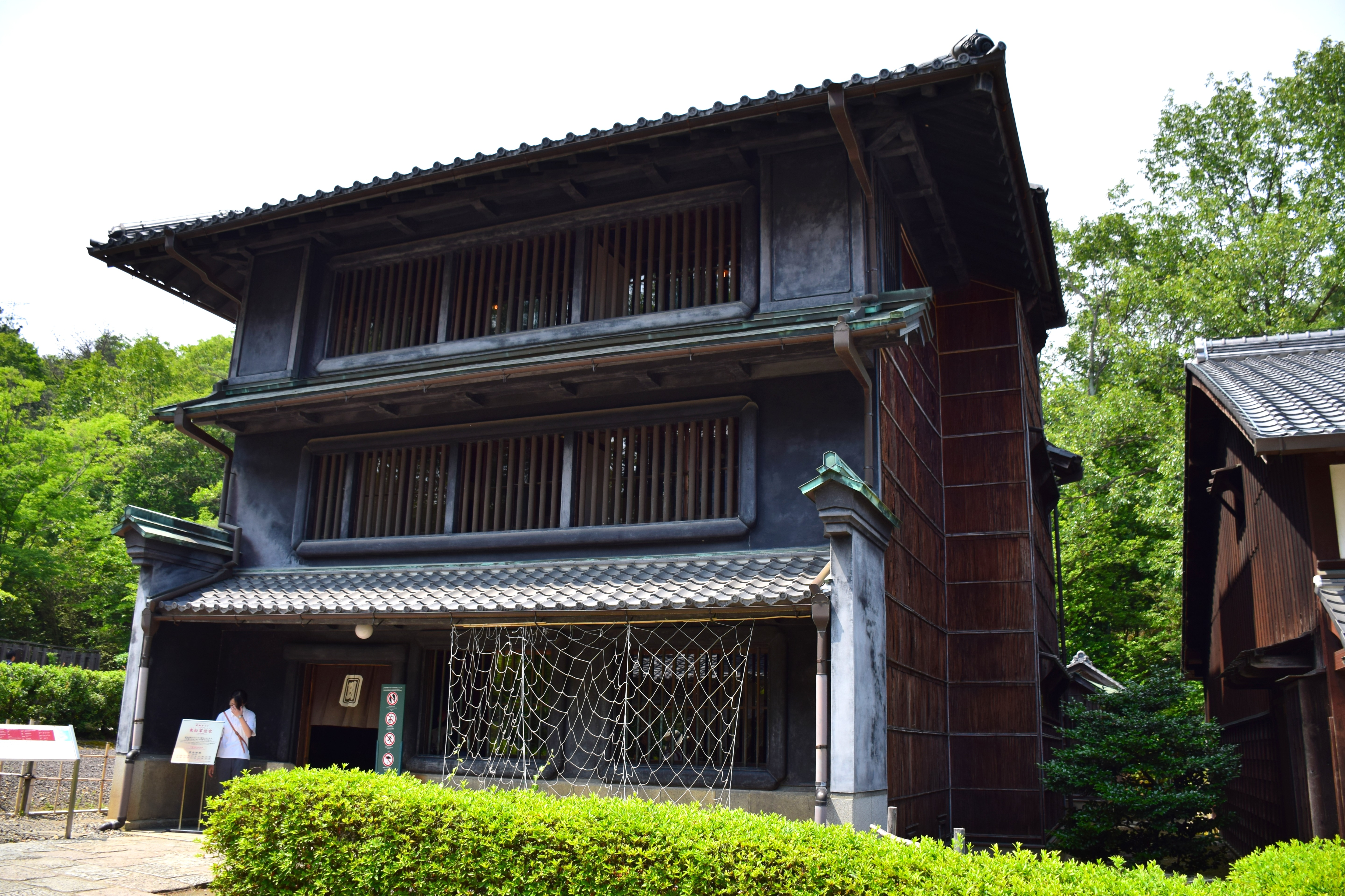 明治村、旧東松家住宅